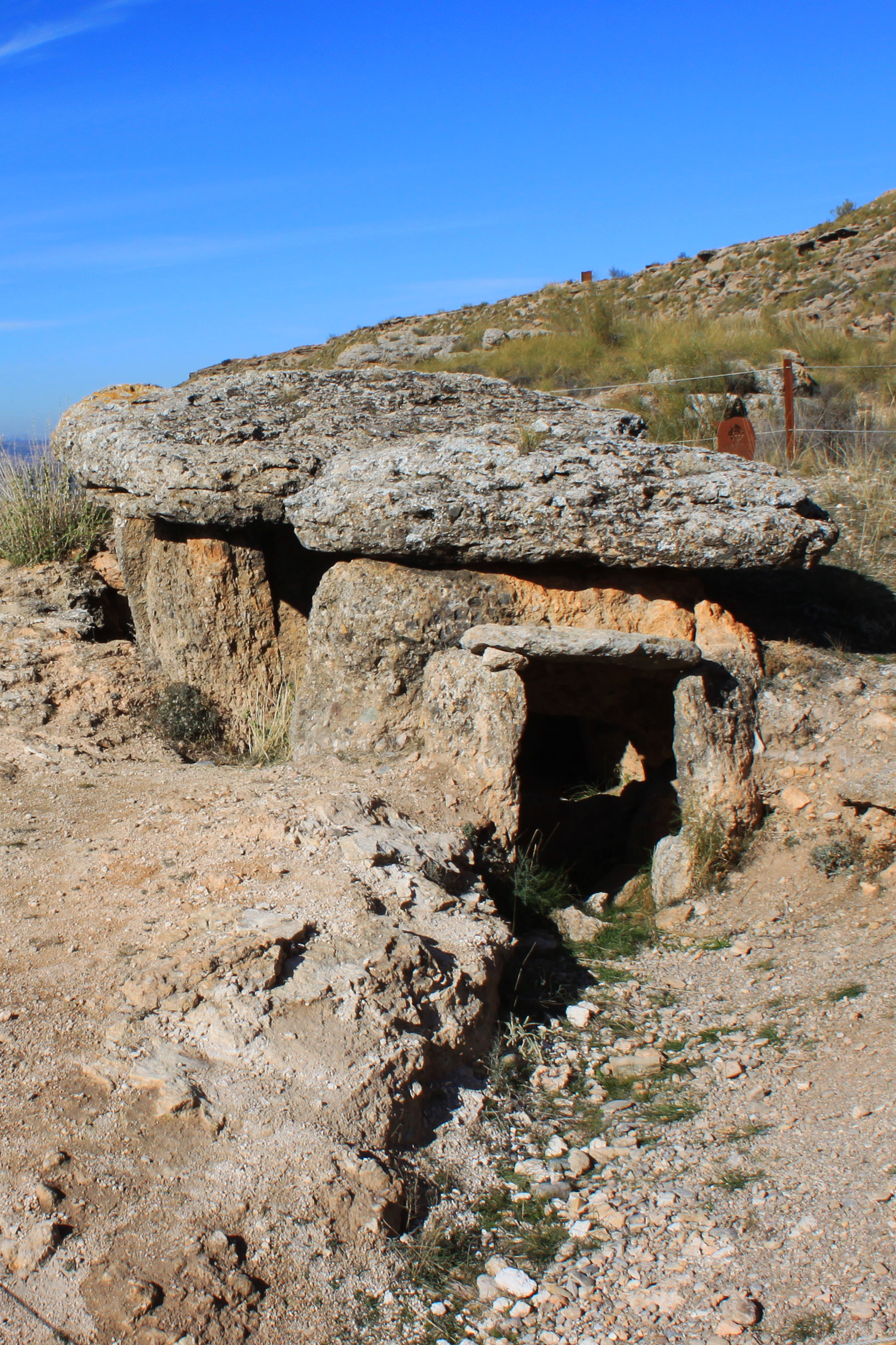 Dolmen 134 del Parque Megalítico de Gorafe situado en la Hoya del Conquil. Gorafe, provincia de Granada, Andalucía, España.